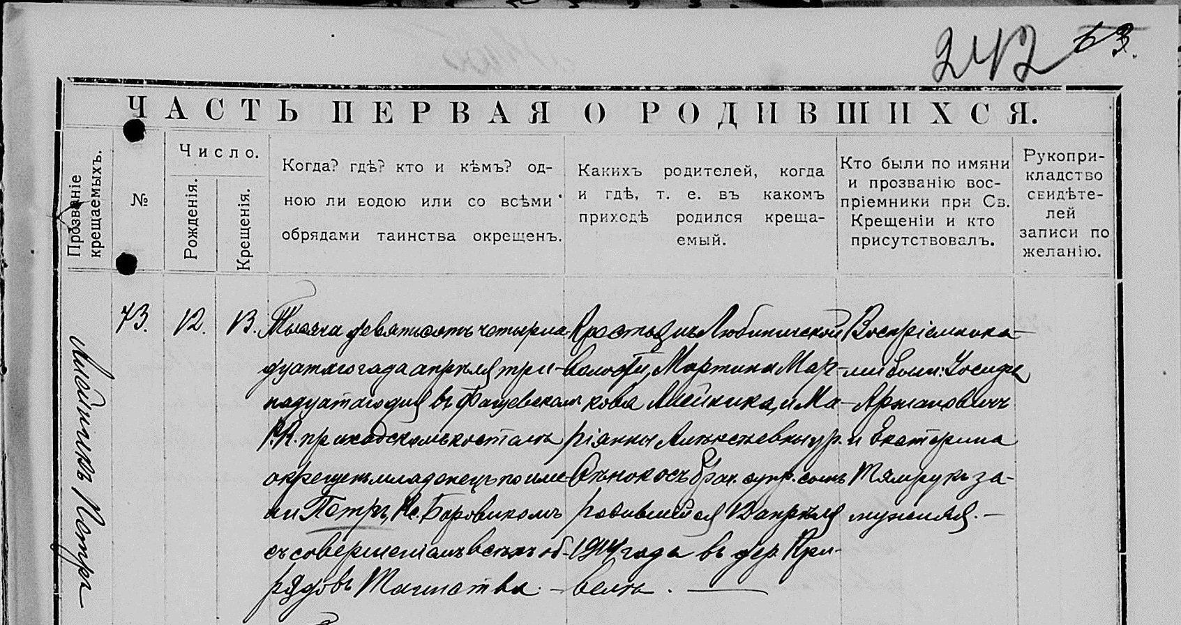 На снимке представлен фрагмент из метрической книги о родившихся католического костёла в д. Фащевка с записью о рождении и крещении будущего киноактёра Петра Алейникова (Национальный исторический архив Беларуси, ф. 1781, оп. 48, д. 23, л. 242, зап. 73)